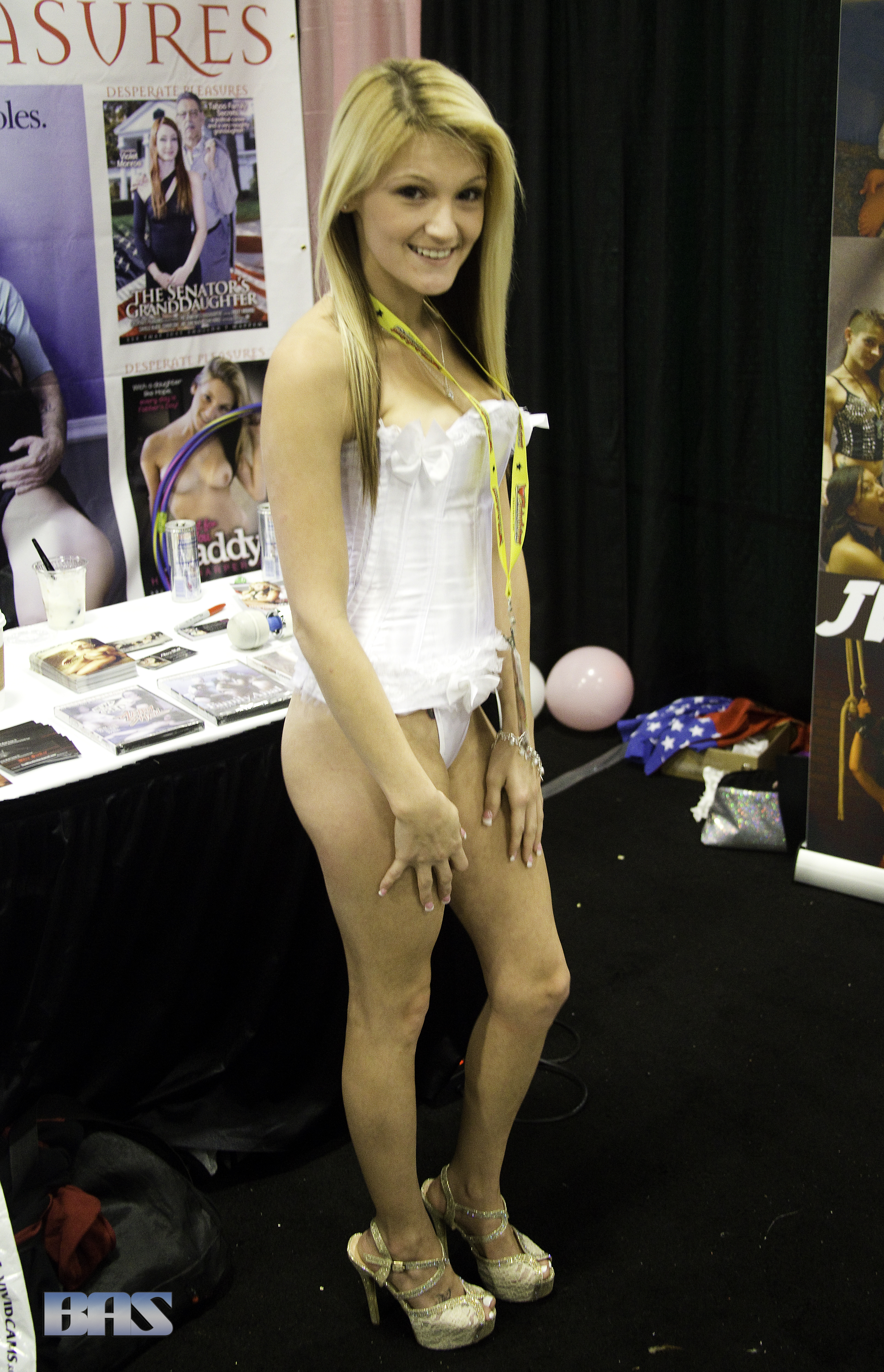 EX15_0065bas